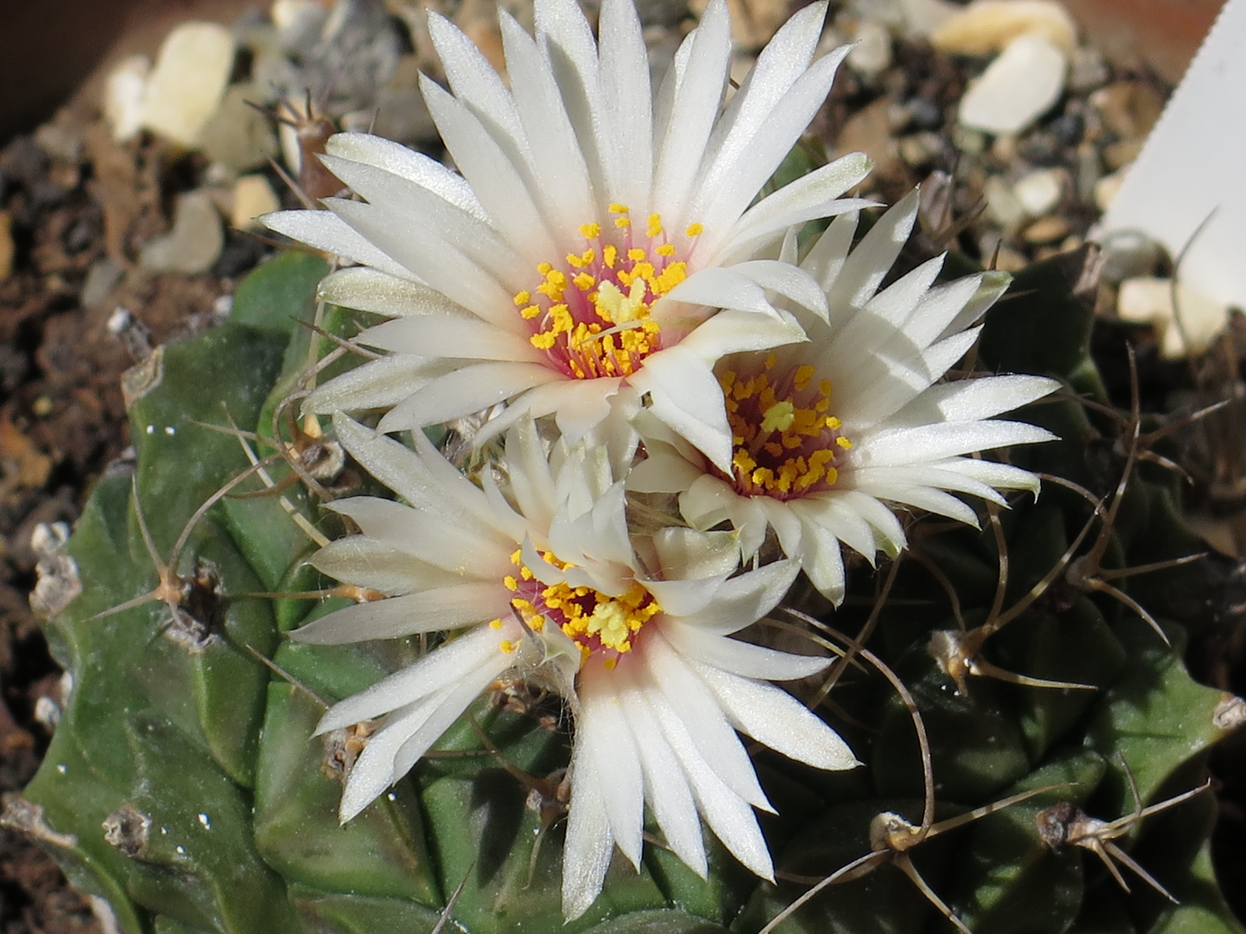 I fiori dell'obregonia denegrii